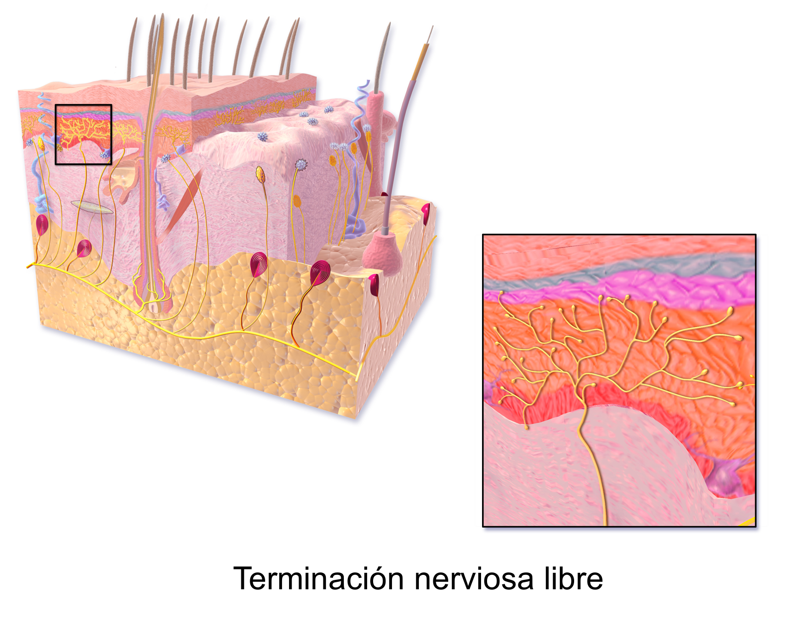 Representación microscópica de la piel en la que son visibles las terminaciónes nerviosas libres responsables de la sensibilidad al dolor.